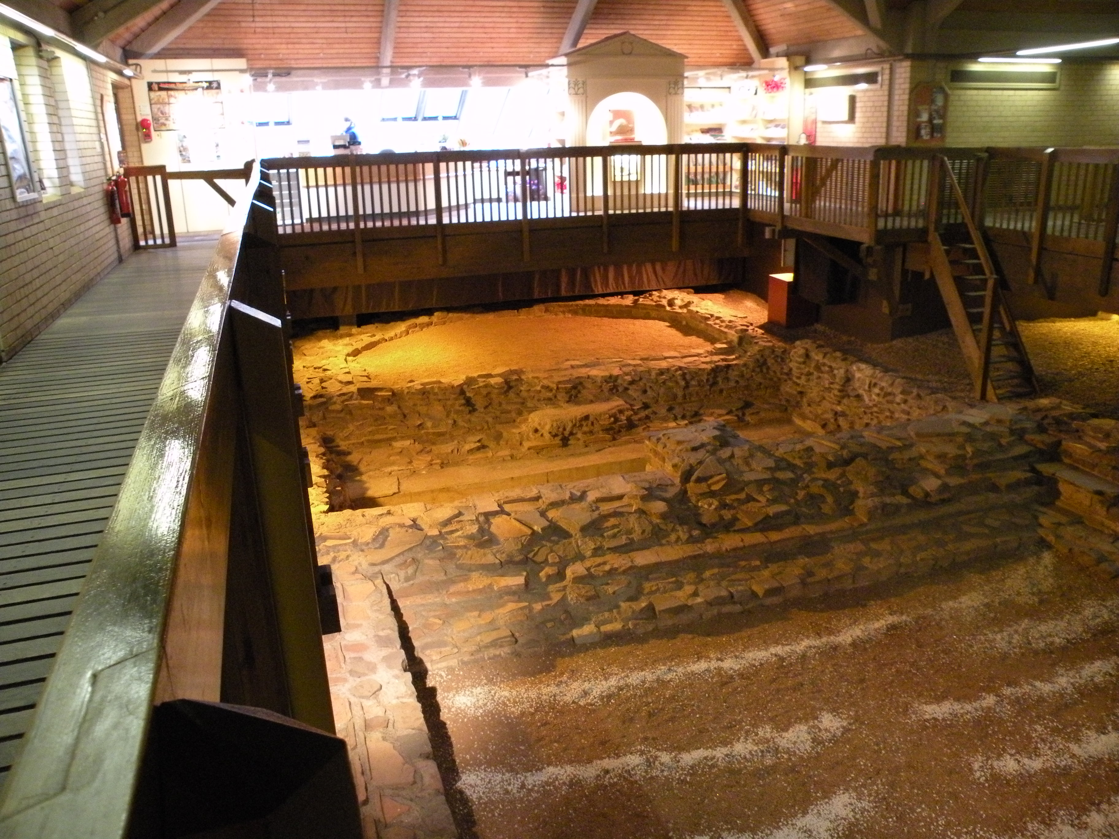 ruine de terme de la ville de caerleon, pays de galles